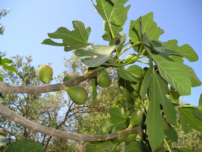 Smokva